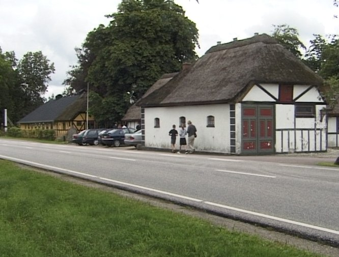 Hvidsten Kro. Mariagervej 450, Hvidsten, 8981 Spentrup (Randers Kommune)